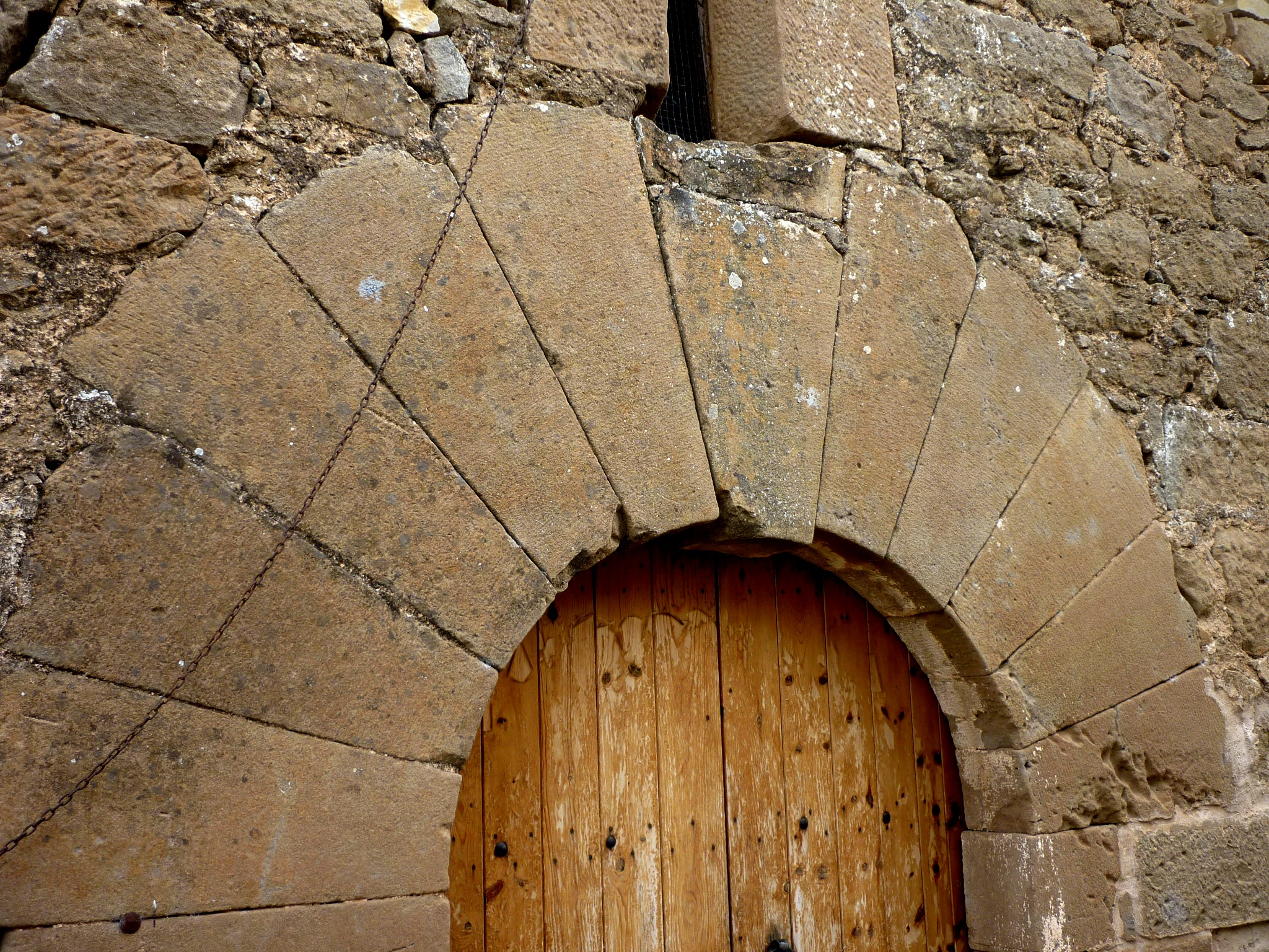 Església de Santa Maria de la Serra (la Baronia de Rialb): portalada